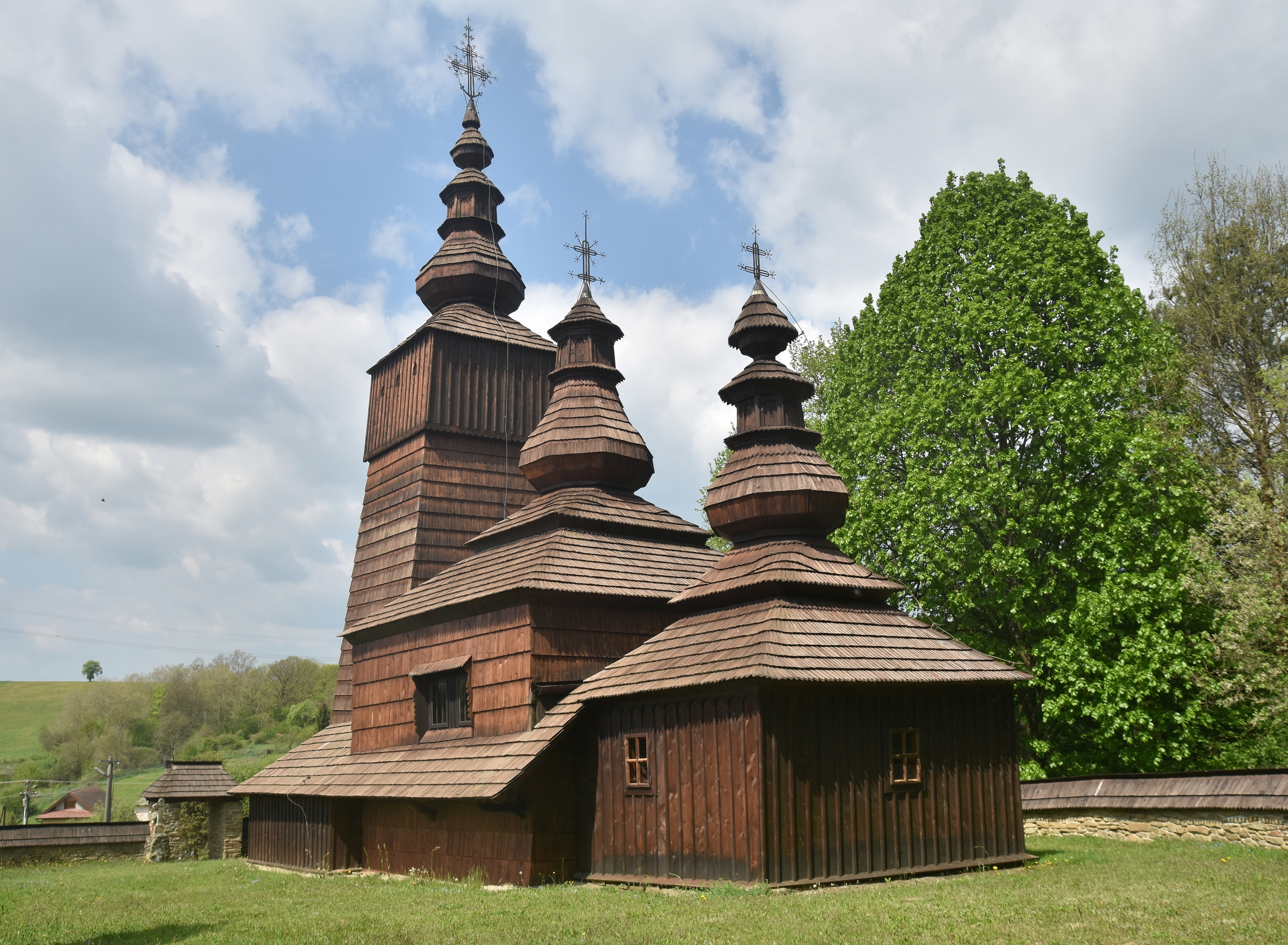 Potoky, chrám svätej Paraskevy